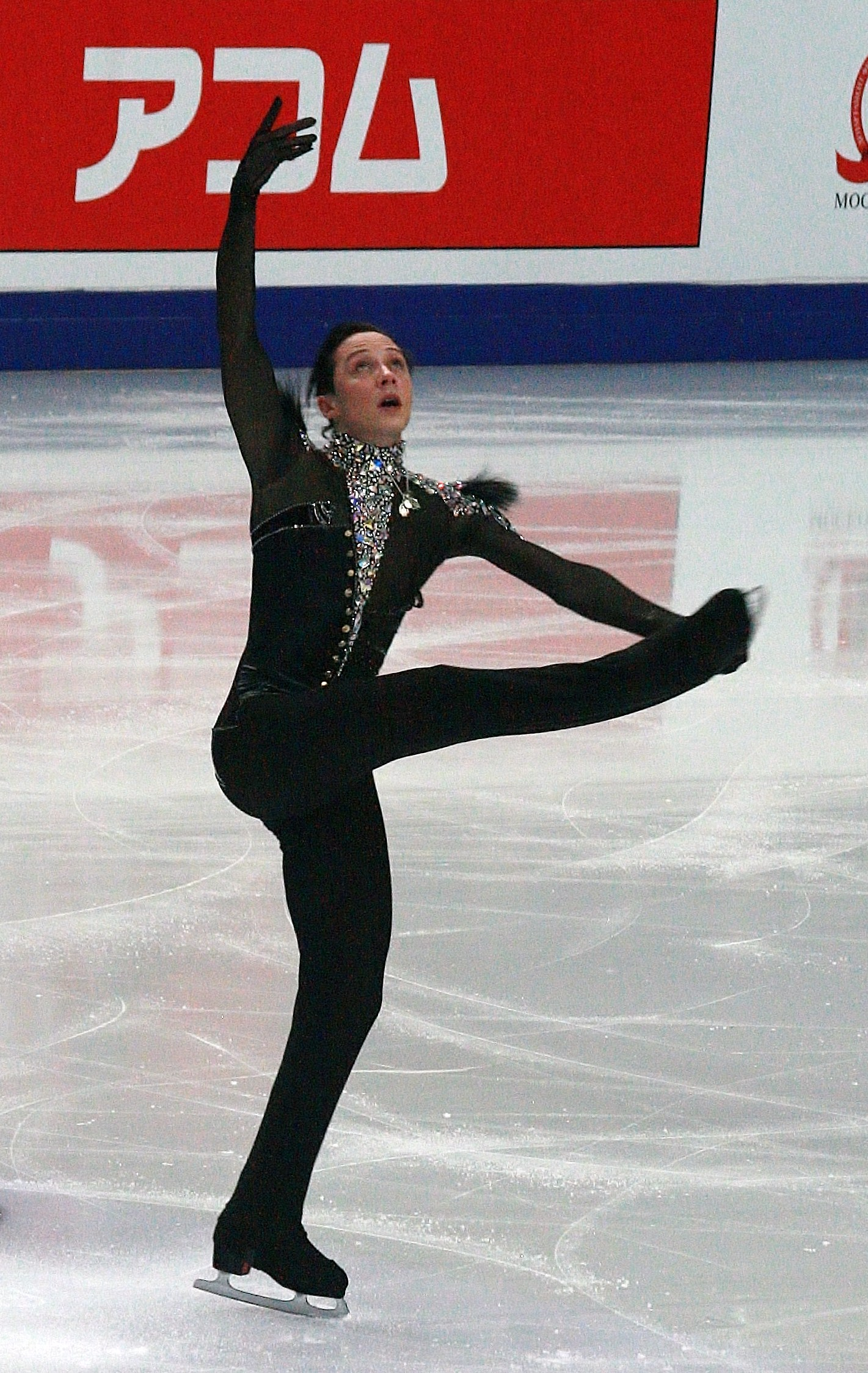 Джонни Вейер на Кубке Ростелекома 2012. Короткая программа.